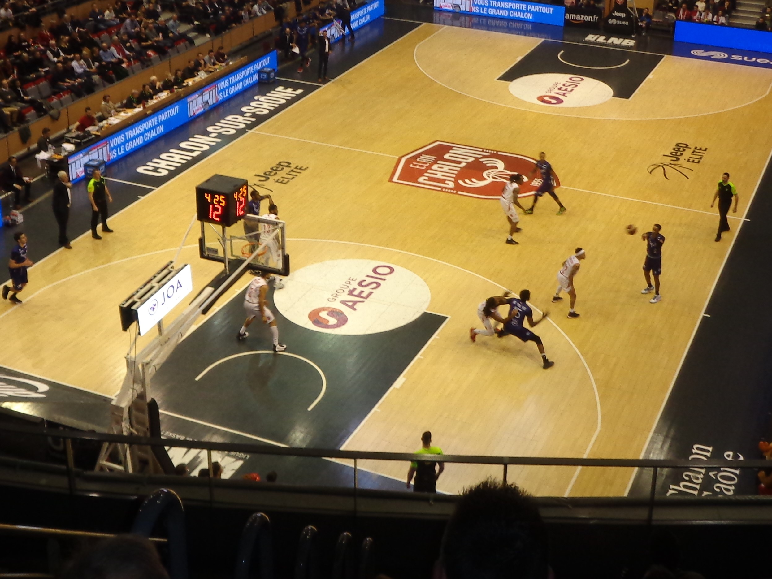 Match de Jeep Elite 2019-2020 entre l'Elan Chalon et la Chorale de Roanne au Colisée de Chalon-sur-Saône.